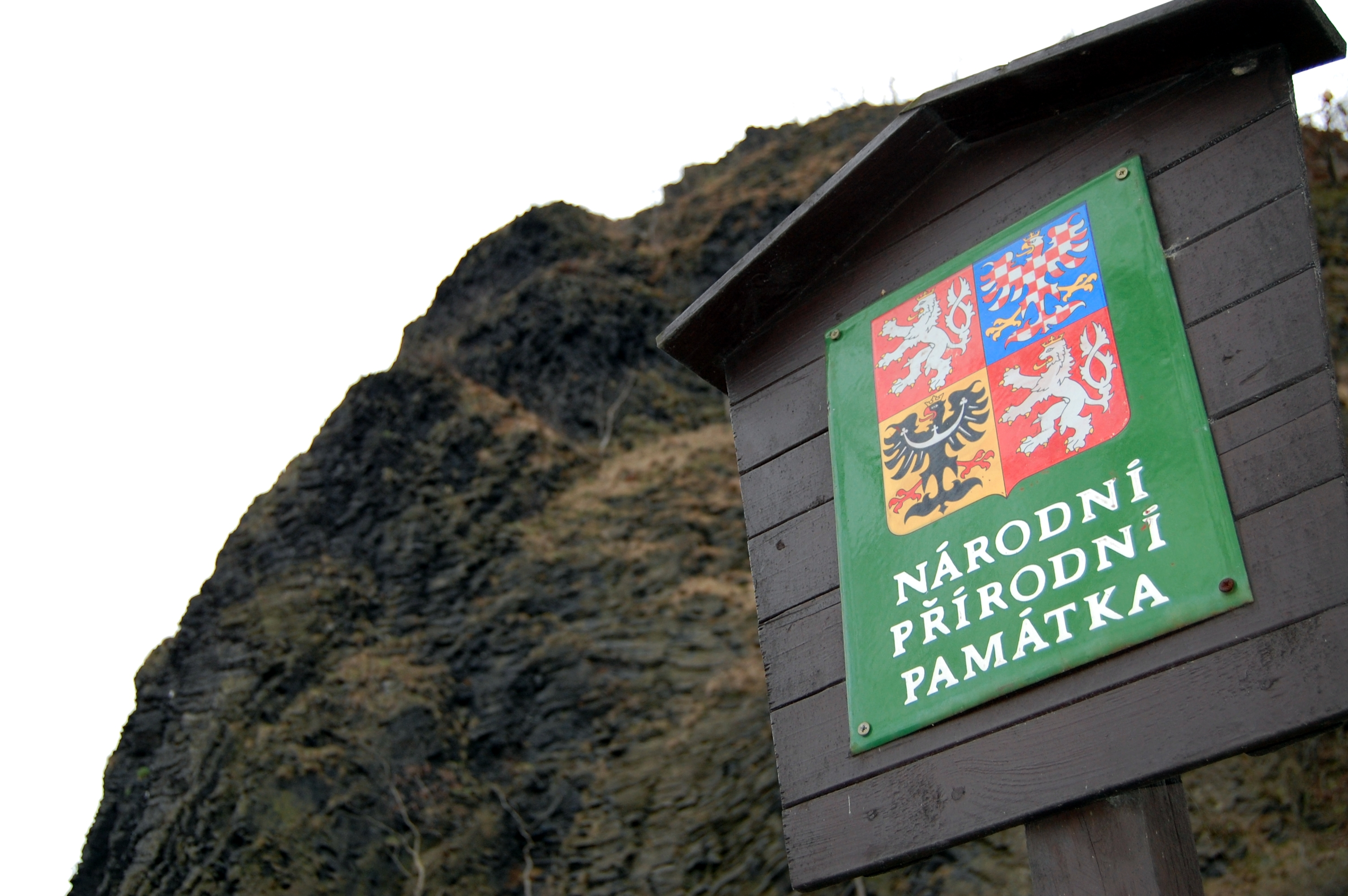 Národní přírodní památka Vrkoč - pohled zespodu.